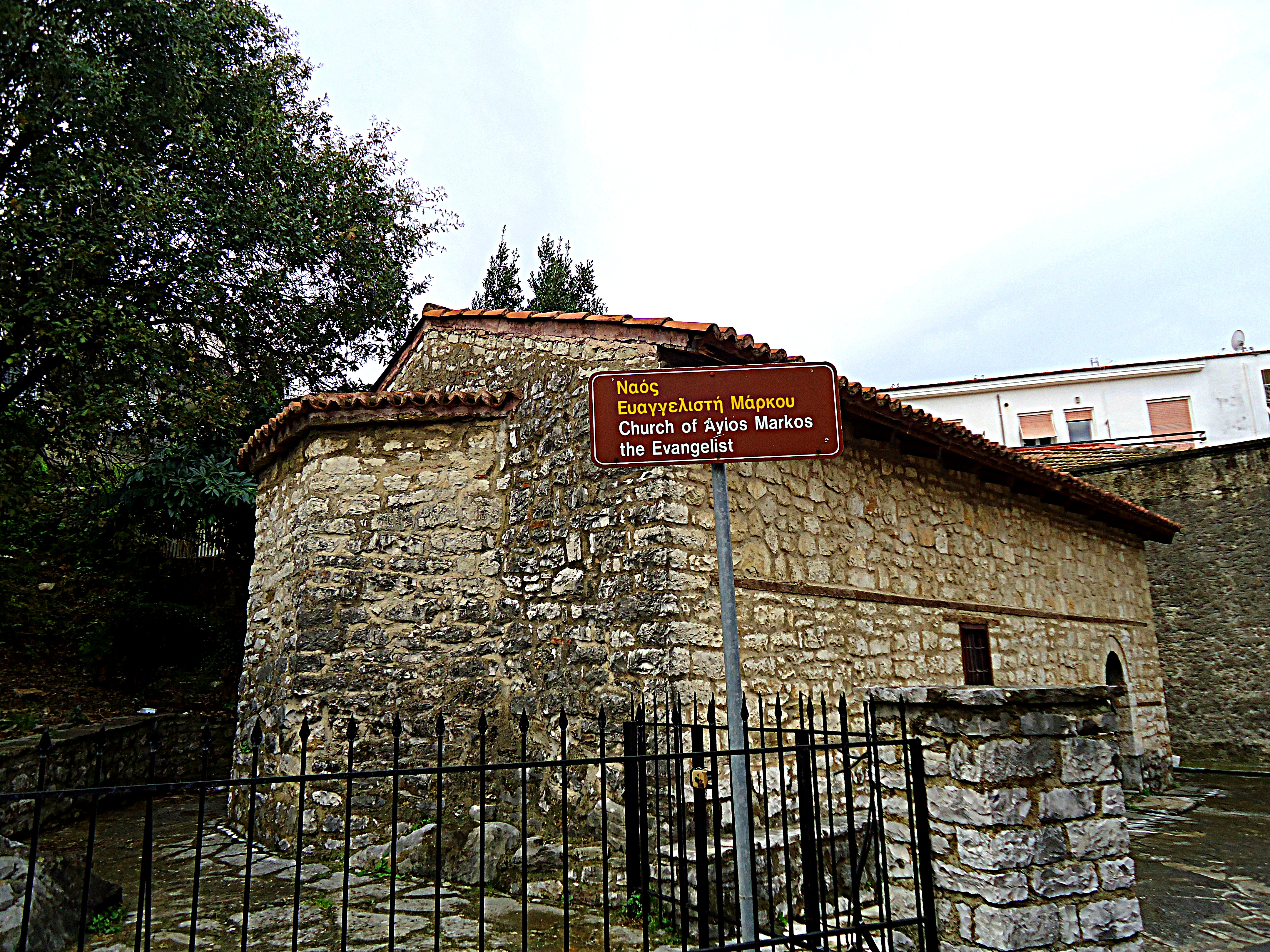 Εκκλησία του Αγίου Μάρκου του Ευαγγελιστή, Άρτα